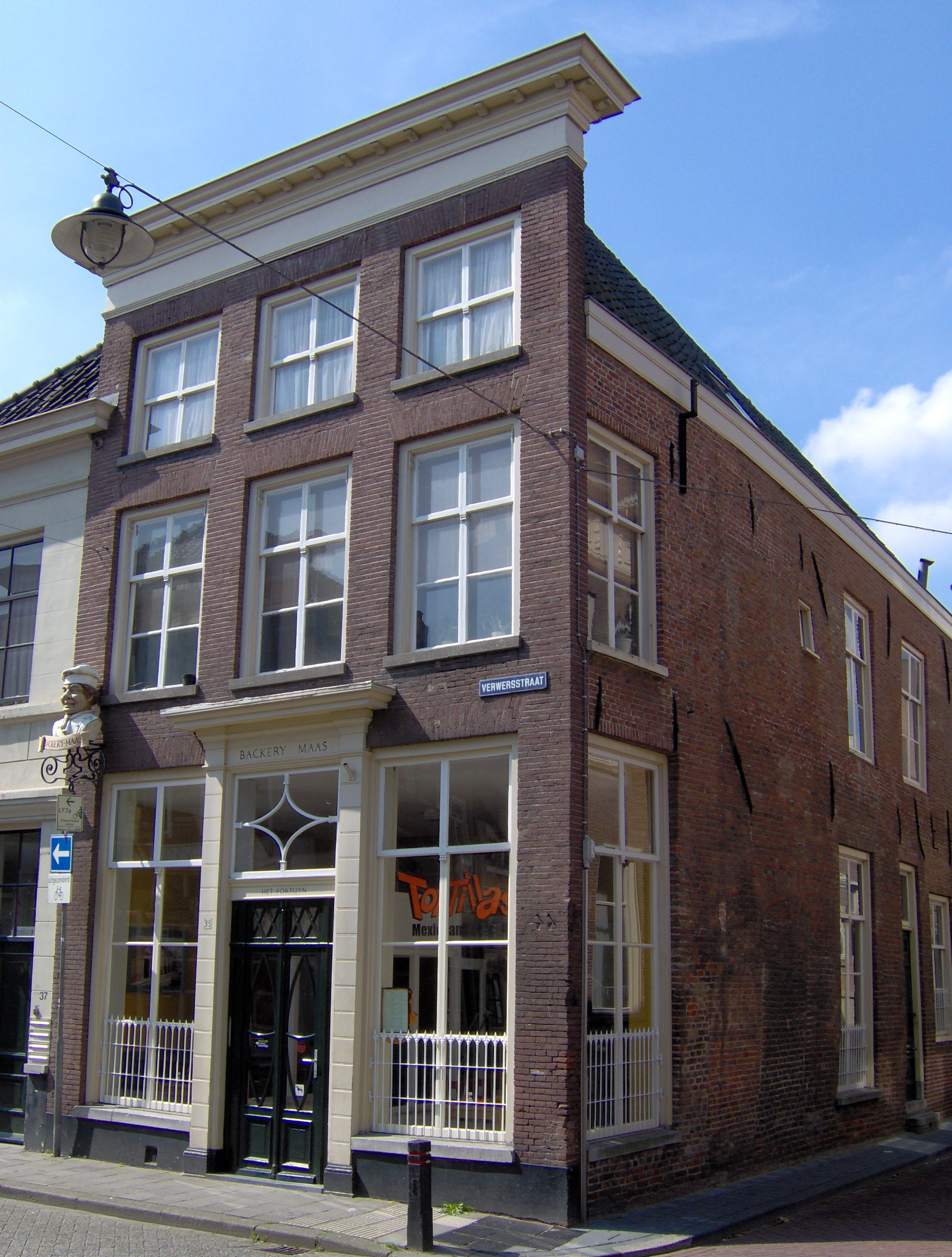 Het Fortuyn, Verwerstraat 35 's-Hertogenbosch